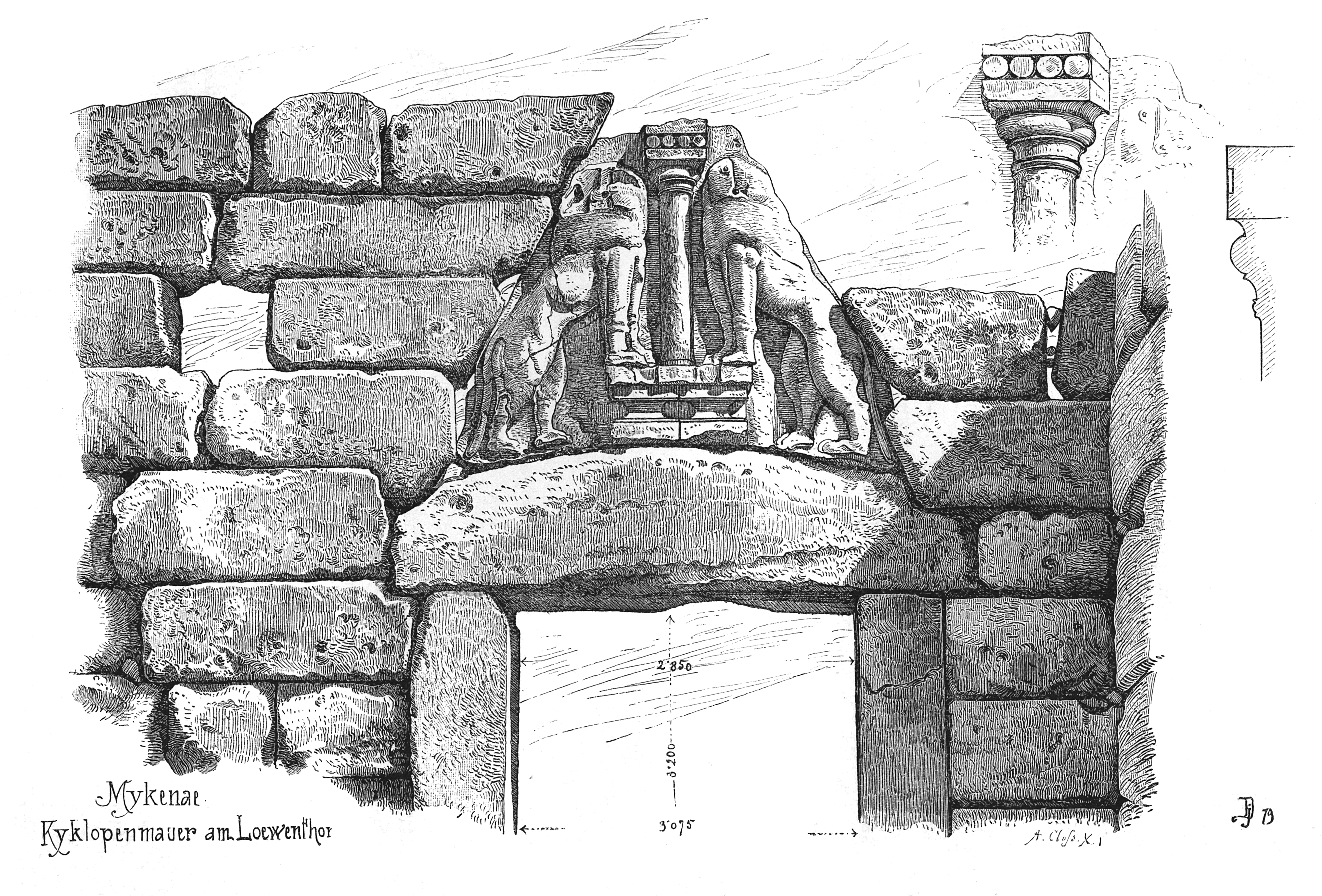 Das Löwentor. Holzschnitt aus dem Institut von Adolf Cloß in Stuttgart. Die Zeichnung findet sich in: Handbuch der Architektur. II. Theil: Die Baustile. Historische und technische Entwicklung. 1. Band: Josef Durm: Die Baukunst der Griechen. Darmstadt 1881. 2. Aufl. Darmstadt 1892. S. 26.